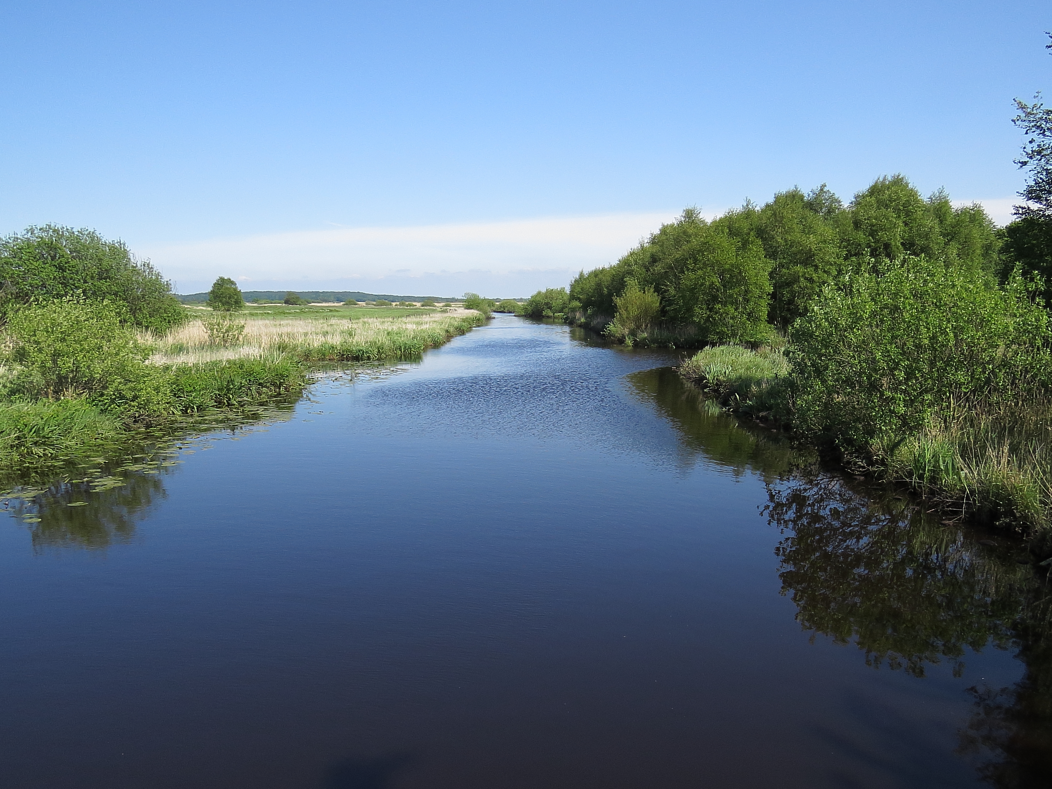 Die Geeste im oberen Bereich des NSG „Geesteniederung“ nördlich Wedel, Foto von der Fahrradbrücke aus aufgenommen